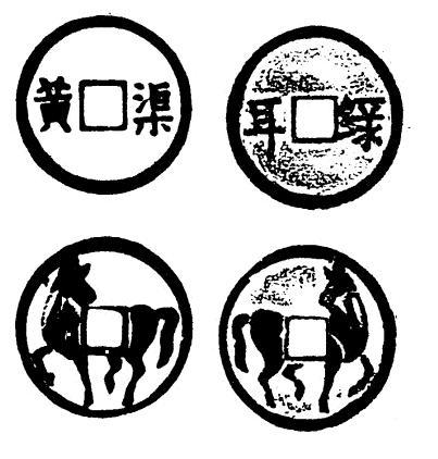 中文（台灣）: 打馬所用的打馬錢